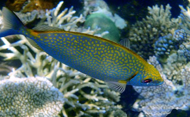 Siganus argenteus, Mirihi, Maldivas